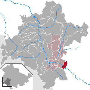 Leutersdorf in Thuringia - District Schmalkalden-Meiningen